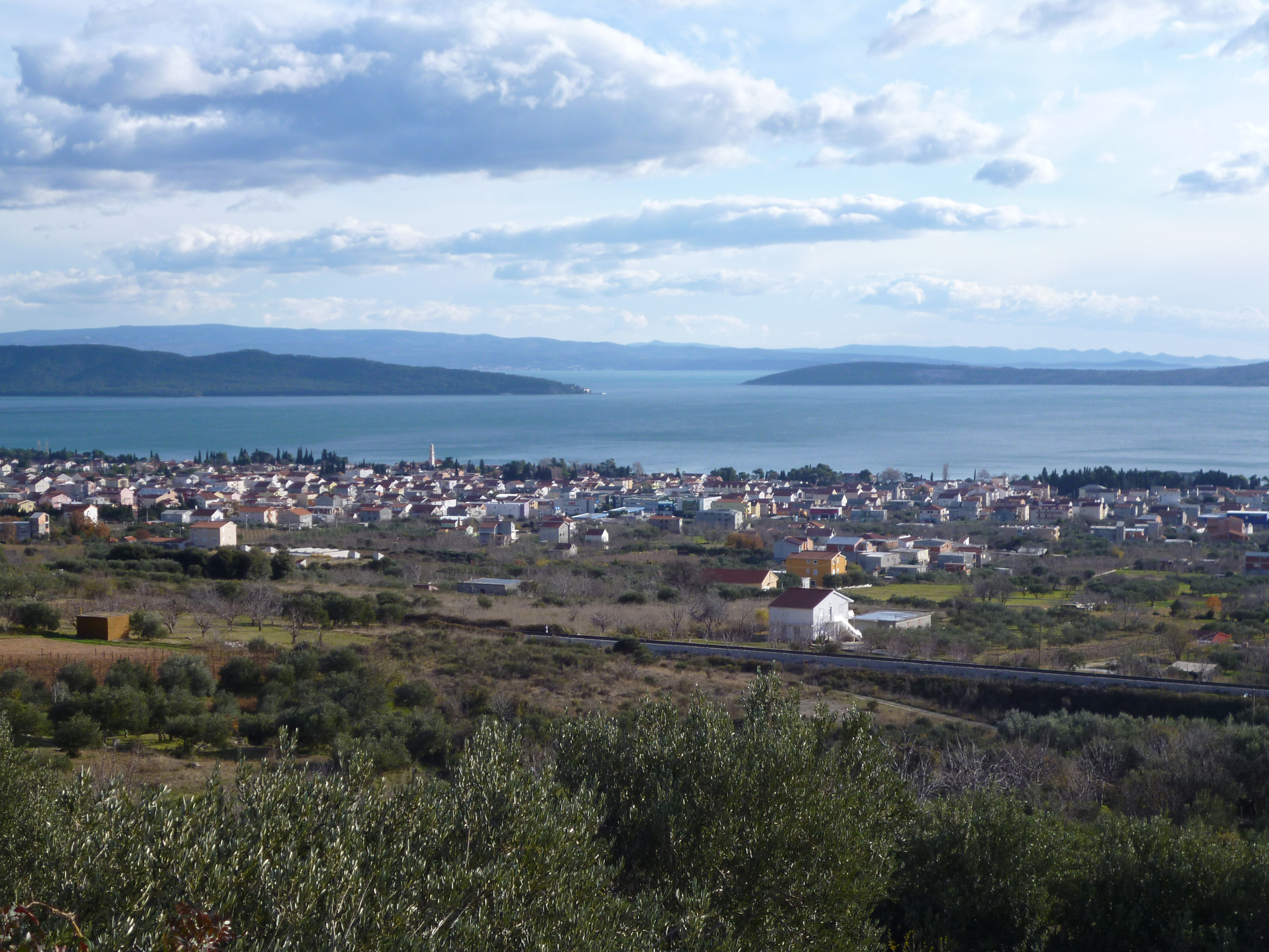 pogled s Kozjaka